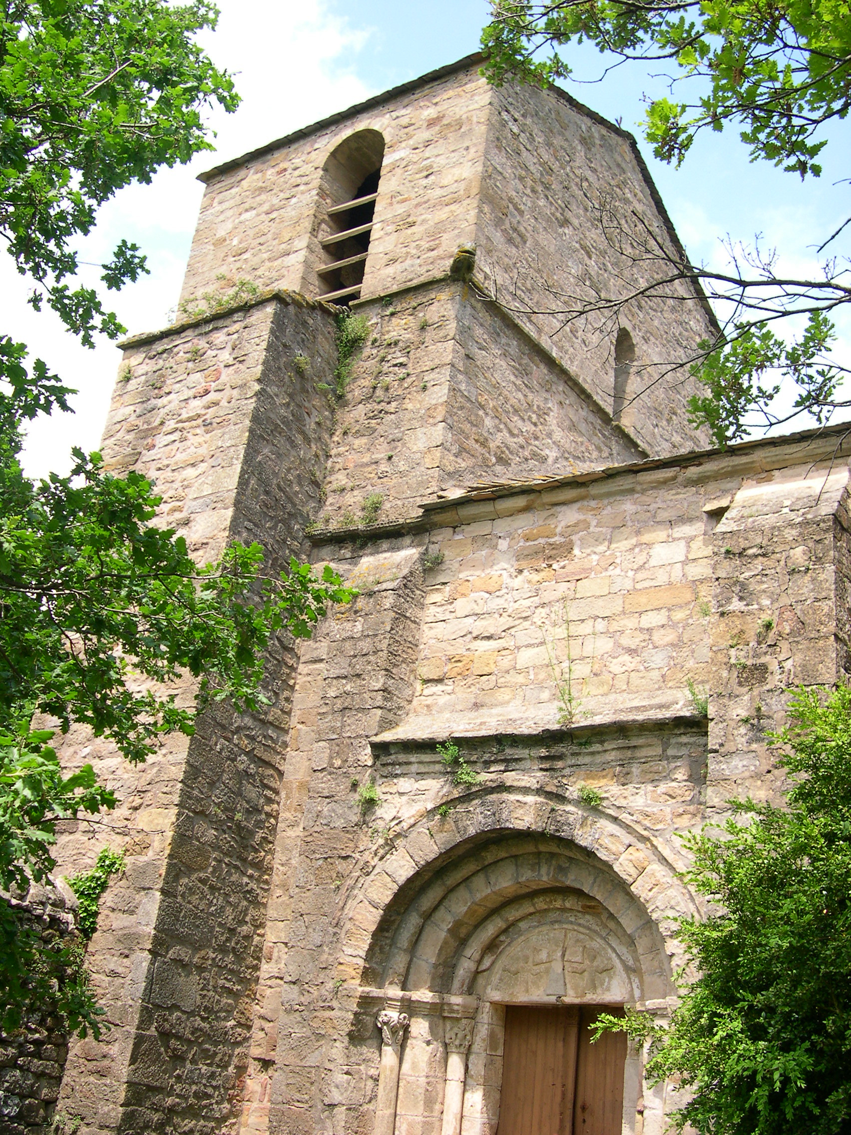 Octon (Hérault) - Portail de Notre-Dame de Roubignac (église romane du XIIe siècle)